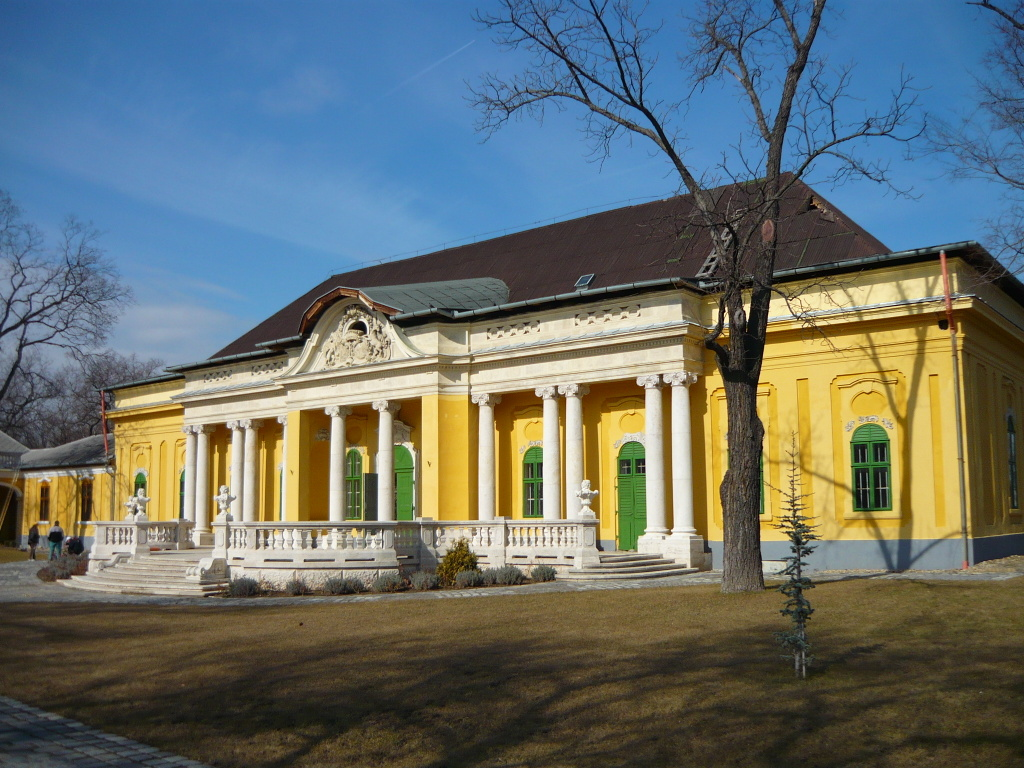 Podmaniczky–Vigyázó-kastély This is a photo of a monument in Hungary. Identifier: 1247